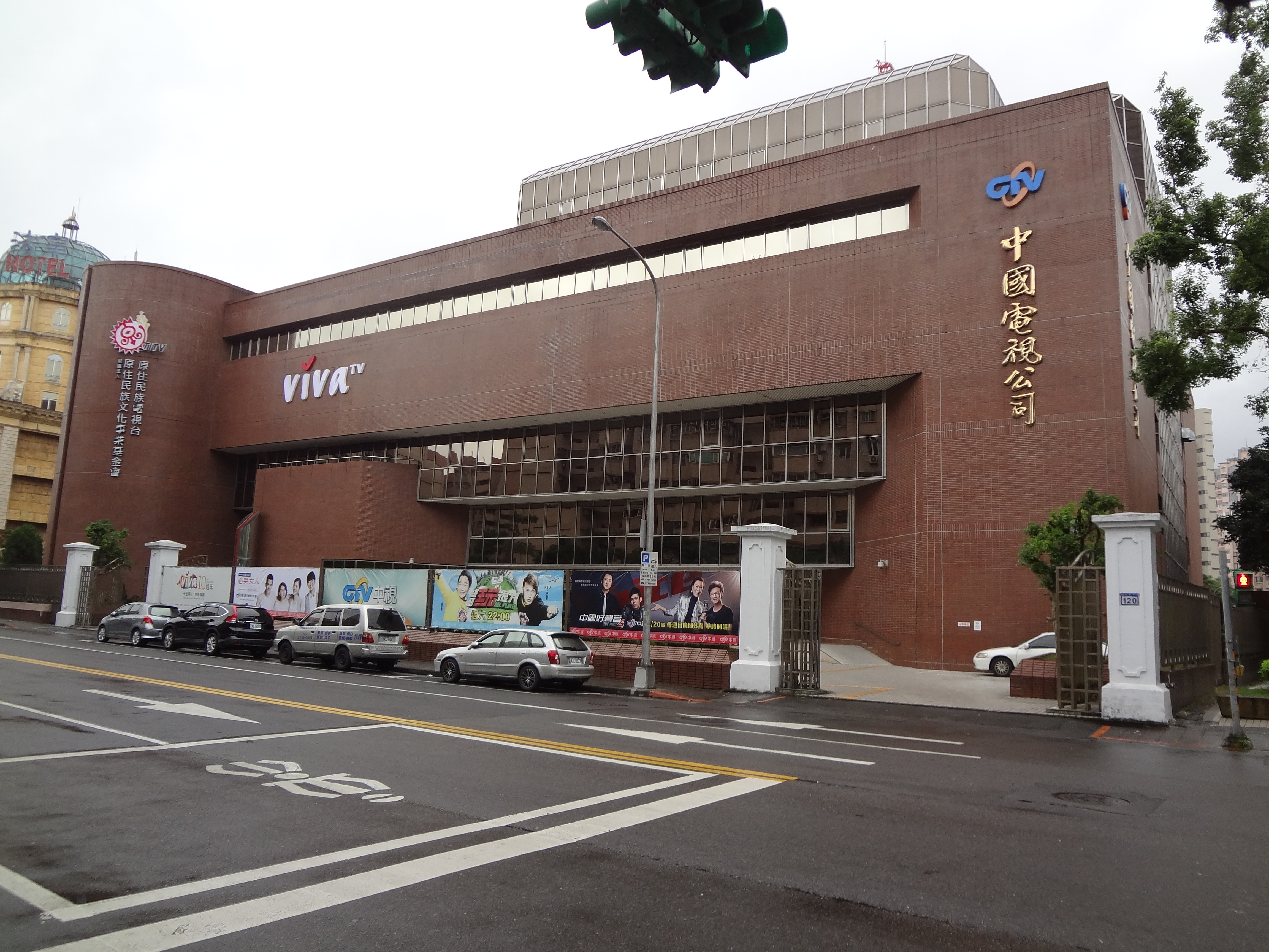 中國電視大廈正面，原住民族電視台總部設於5樓，ViVa TV總部設於6樓。